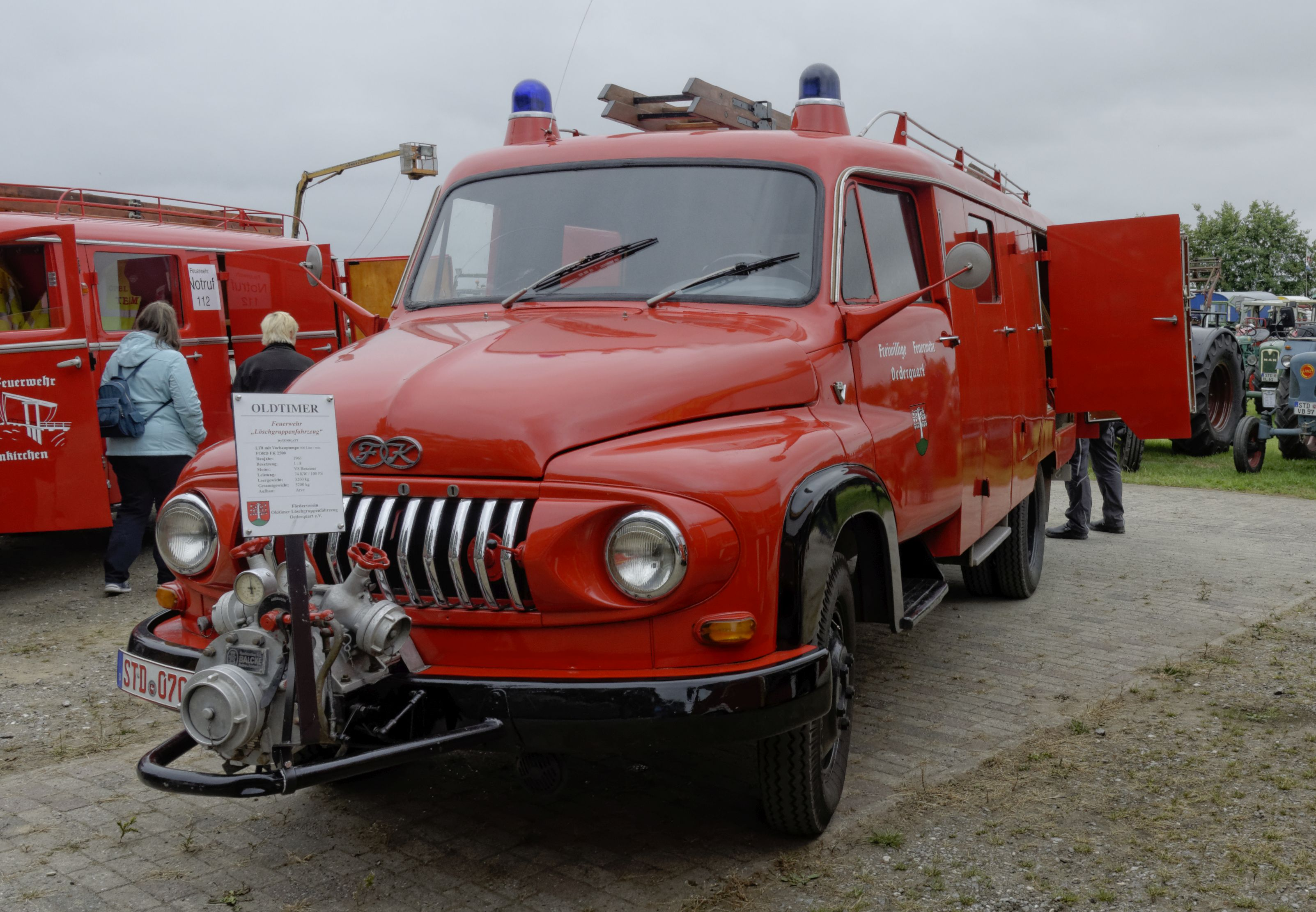 Bilder vom 3. Treckertreffen in Balje 2019